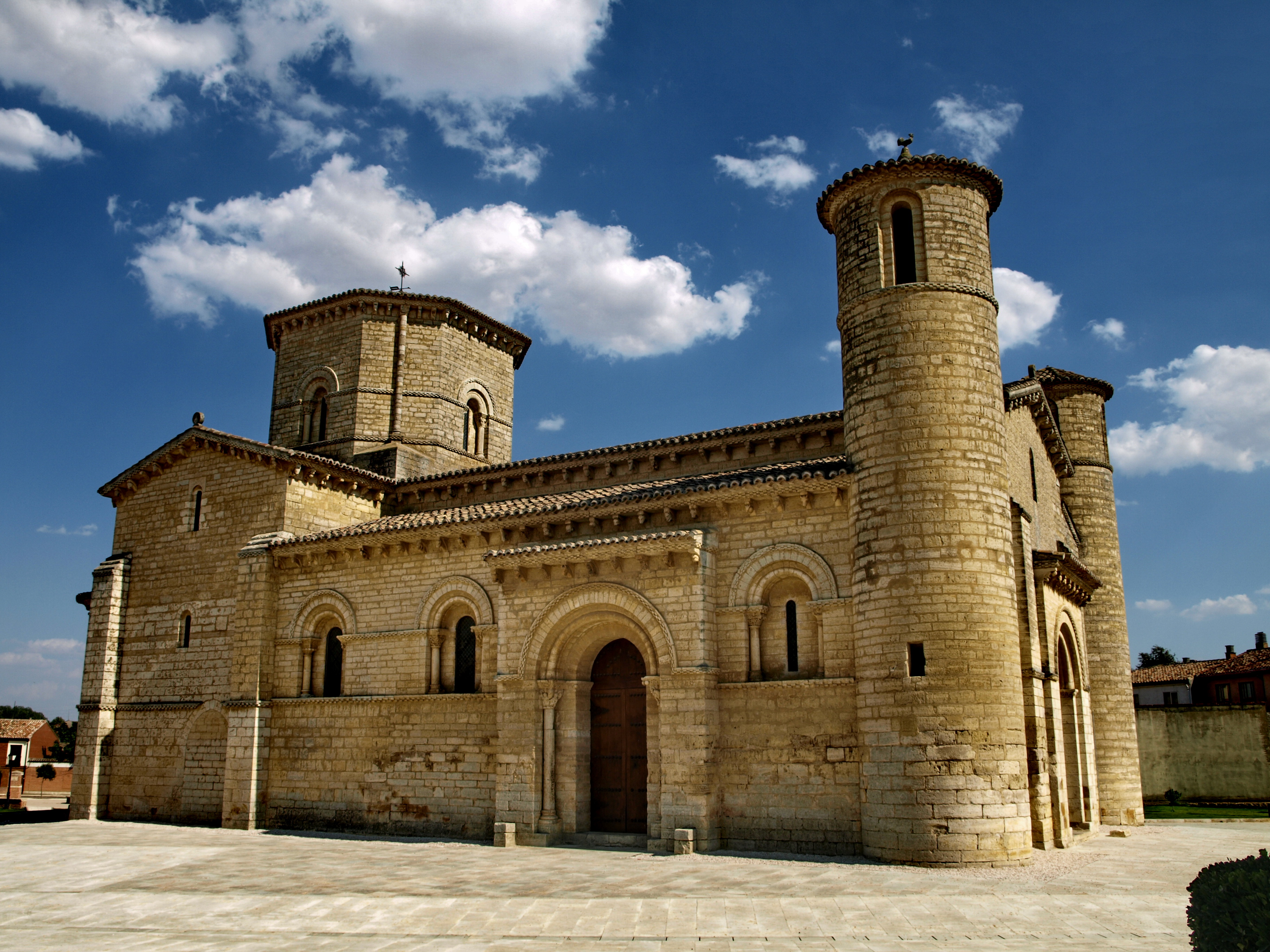 Església del monestir benedictí de San Martín de Frómista (Frómista-Palència, Espanya) d'estil romànic (S.XI)